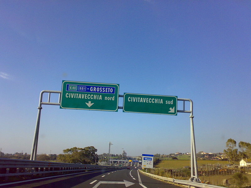 Ukazatele na dálnici A 12 v Itálii